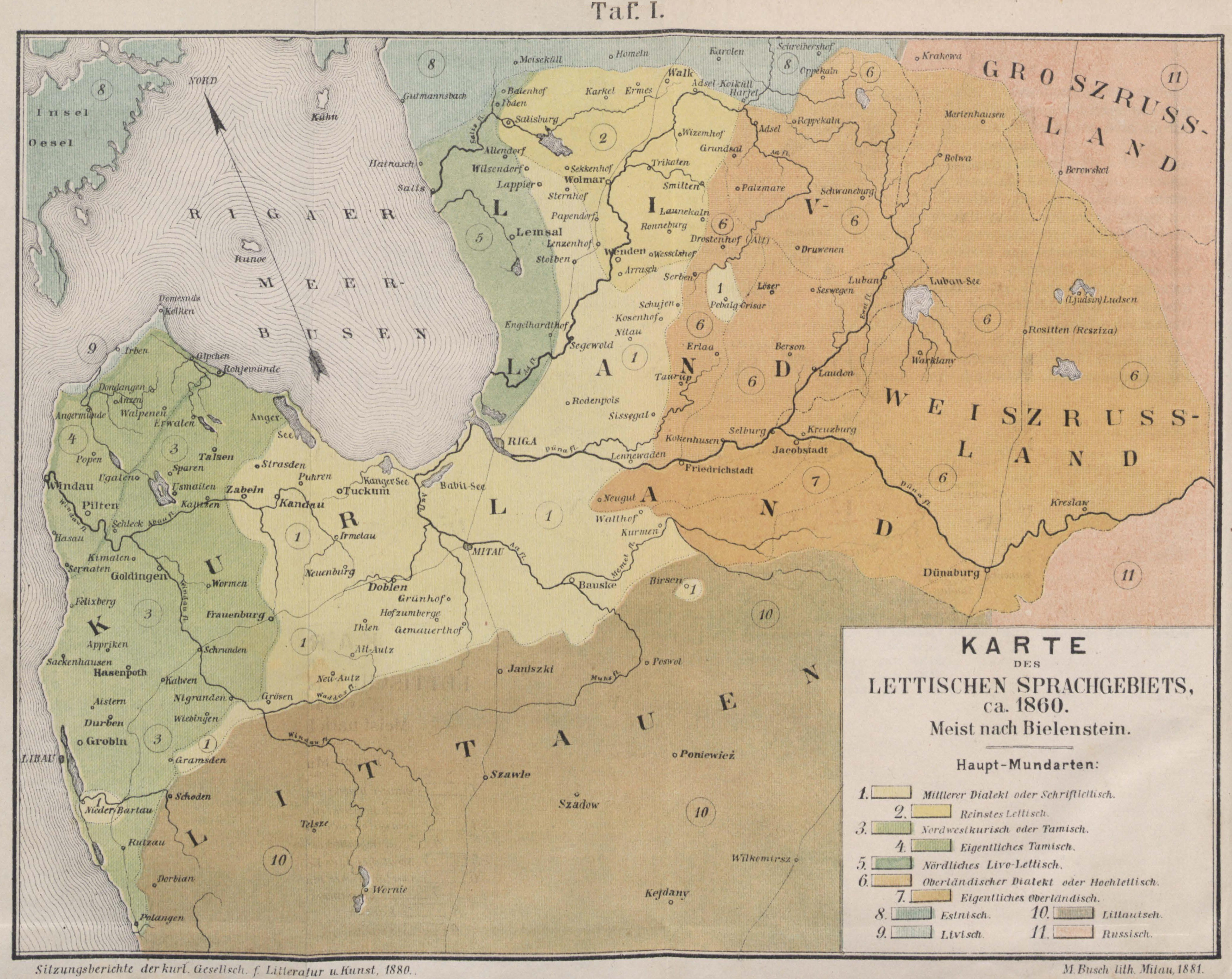 Karte des lettischen Sprachgebietes ca. 1860 nach Bielenstein mit Dialektgrenzen und Nachbarsprachen. Quelle: Julius Döring: „Über die Herkunft der kurländischen Letten“. (mit 2 Tafeln) in „Sitzungs-Berichte der kurländischen Gesellschaft für Literatur und Kunst nebst Veröffentlichungen des kurländischen Provinzial-Museums aus dem Jahre 1880“. Verlegt bei Steffenhagen und Sohn, Mitau 1881. pp. 47 - 118